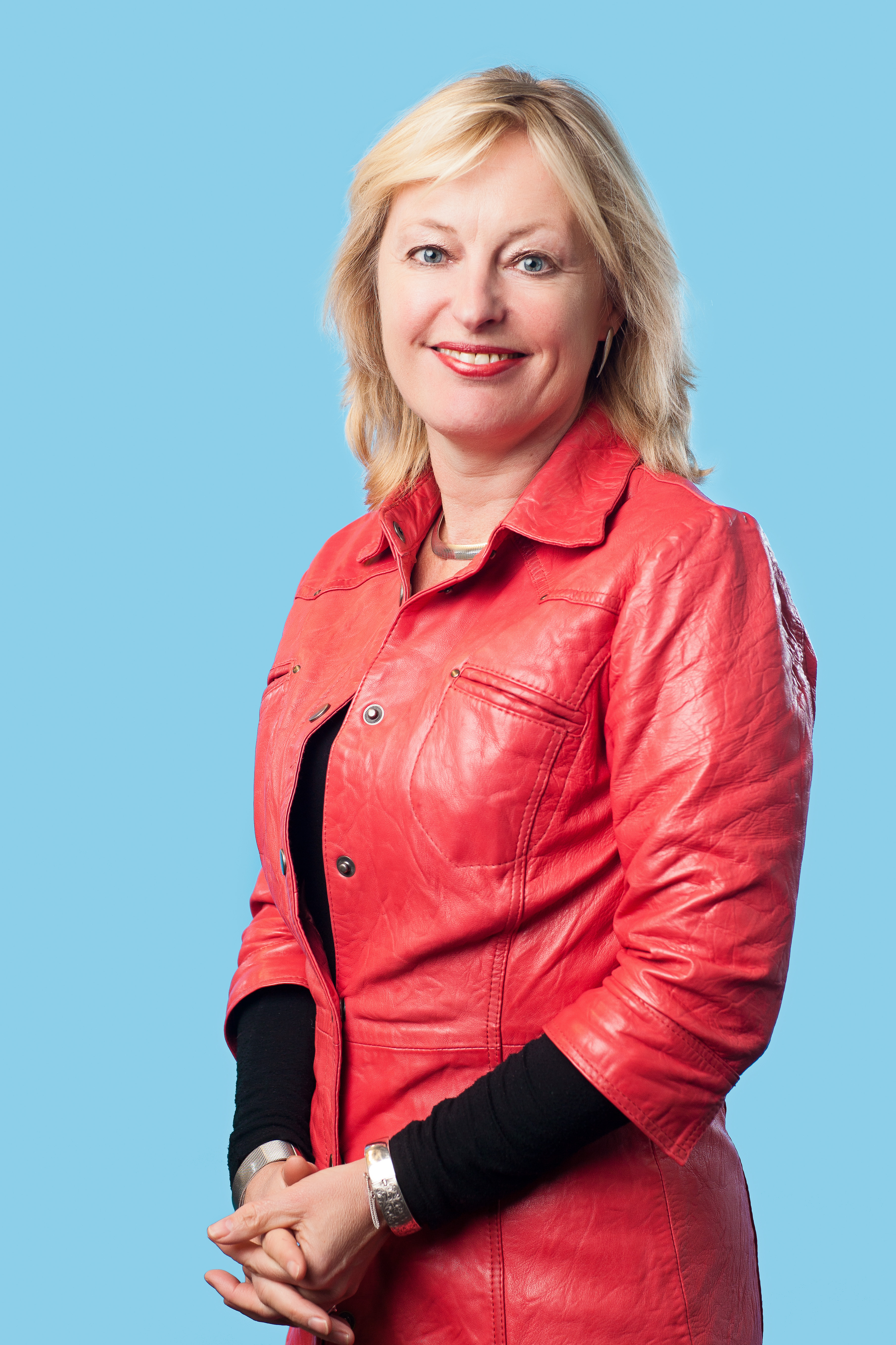 De beeldredaktie / Martin hoogenboom Jet Bussemaker Minister van Onderwijs, Cultuur en Wetenschappen